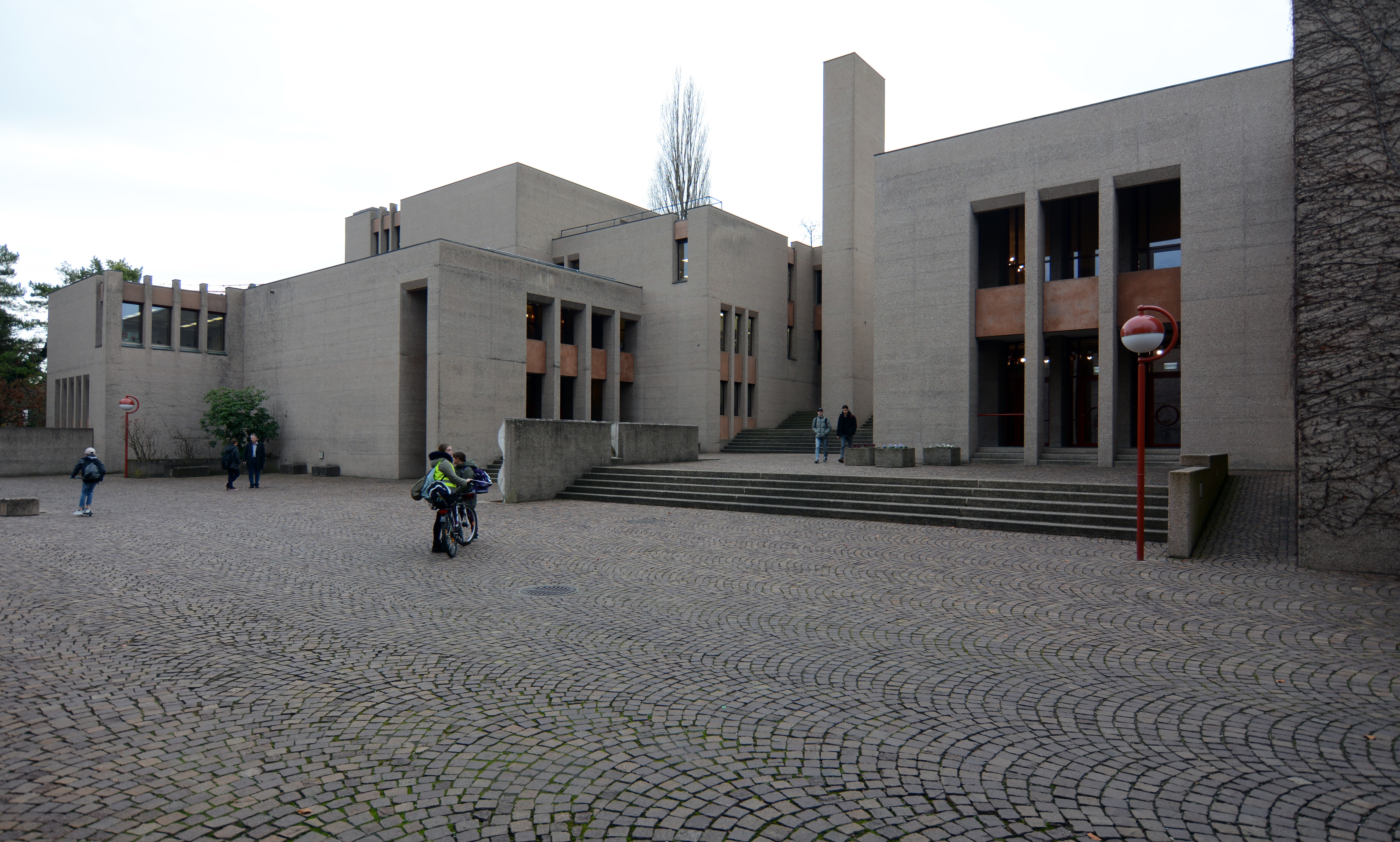 Kantonales Lehrerseminar Kreuzlingen (heute Pädagogische Maturitätsschule Kreuzlingen), Kreuzlingen, 1965–72. Schulplatz. Wissenschaftstrakt links, Aulatrakt rechts. Architekten: Rudolf und Esther Guyer